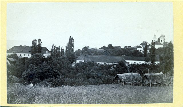 Grad Raka 1890